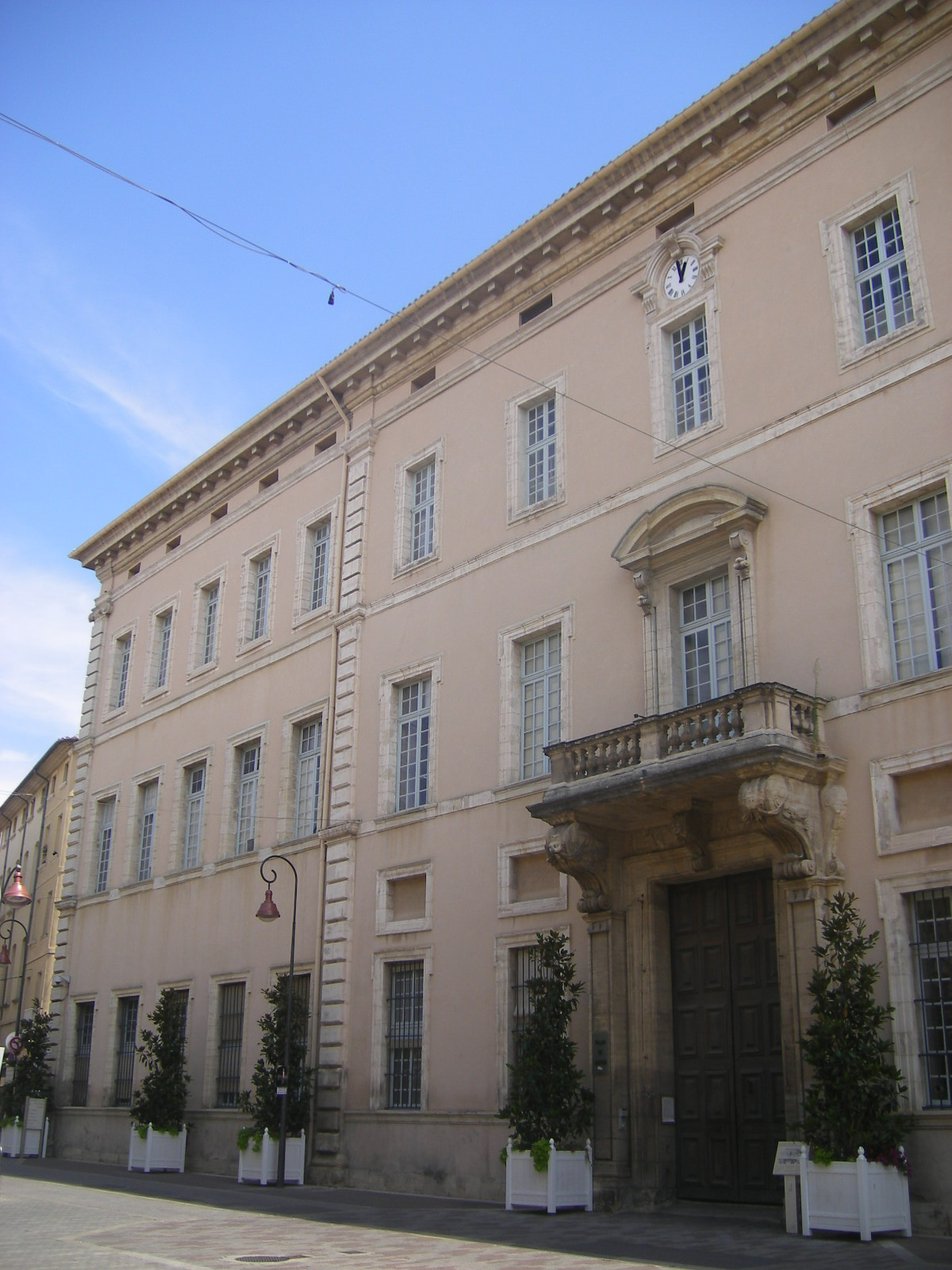 Carpentras